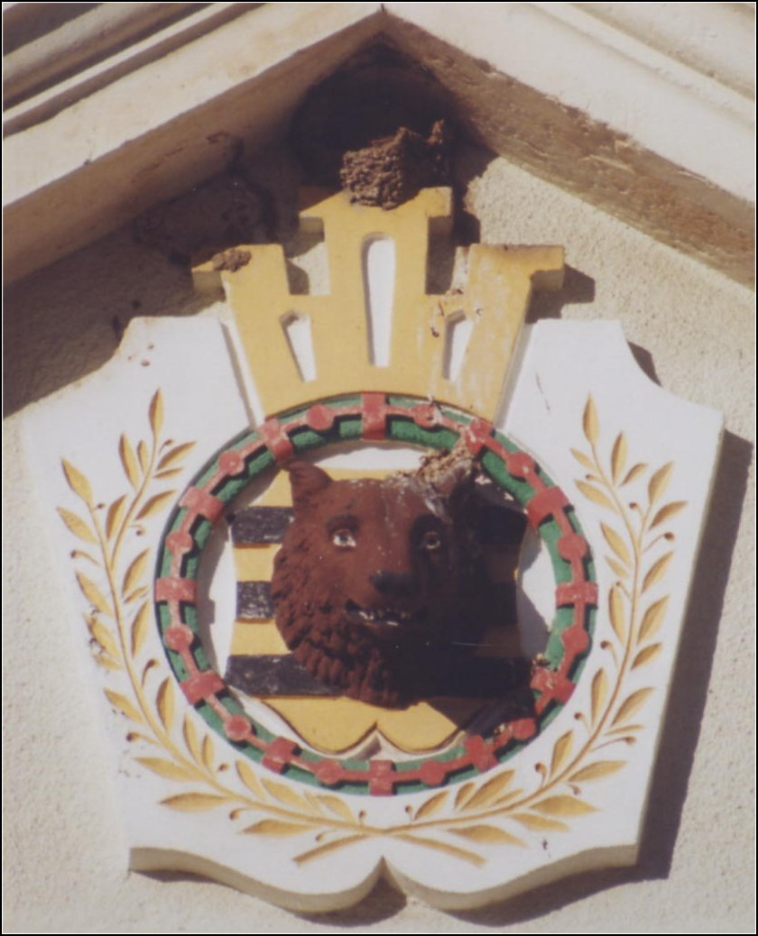 Bärenstein (Altenberg): Stadtwappen am Rathaus